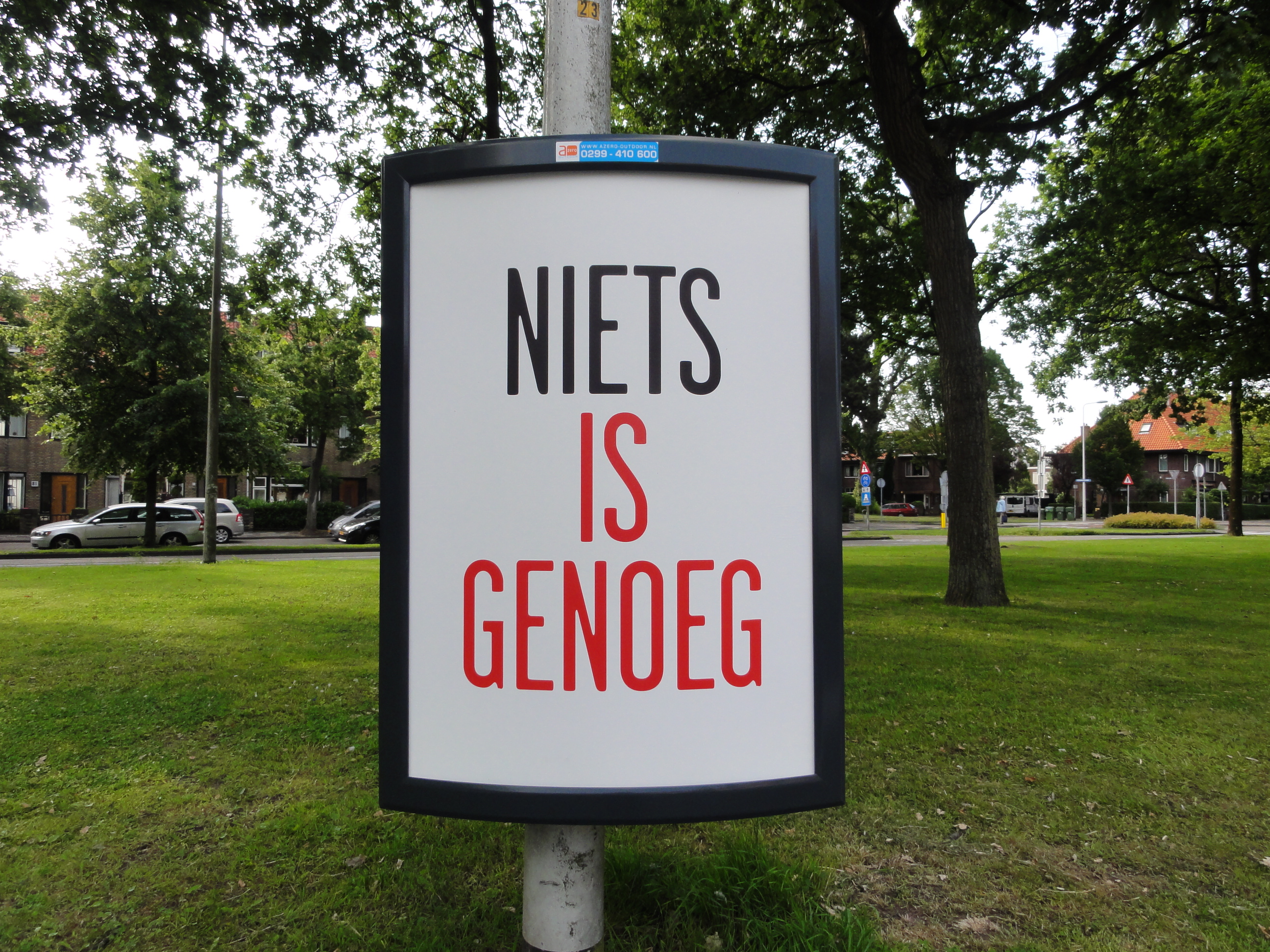 Reclamebord van Herman van Bostelen en Martijn Engelbregt voor de duotentoonstelling NIETS IS GENOEG in HEDEN aan de Denneweg 14a en Doornstraat 1 in Den Haag alwaar het archief van Herman van Bostelen en Martijn Engelbregt hoofdrollen spelen. 22 juni t/m 25 augustus 2012.